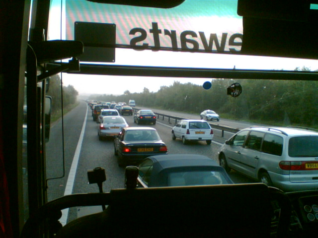 Late again